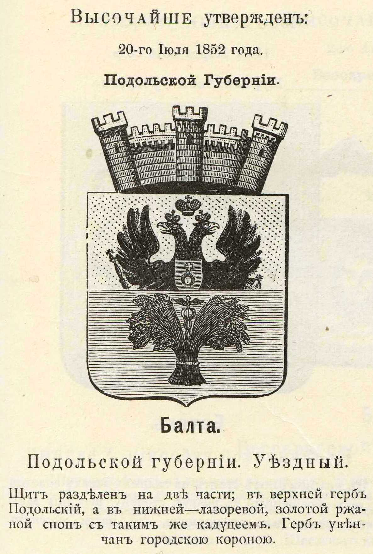 Official Russian Empire coat of arms Balta. Герб Российской Империи города уездного города Балта Подольской губернии с официальным описанием в Гербовнике Винклера.